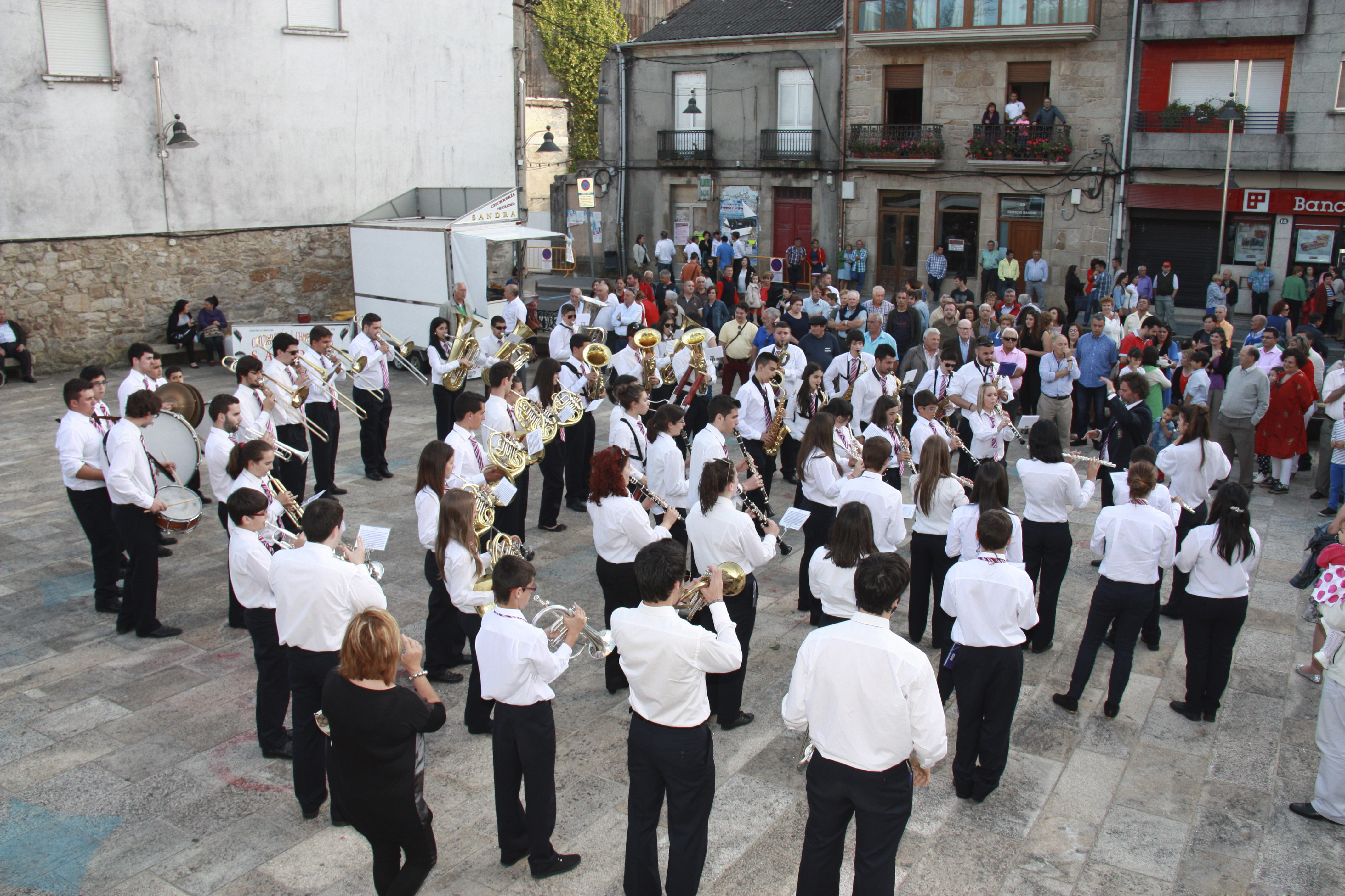 Banda de Música Municipal de Valga nunha festa en Pontecesures